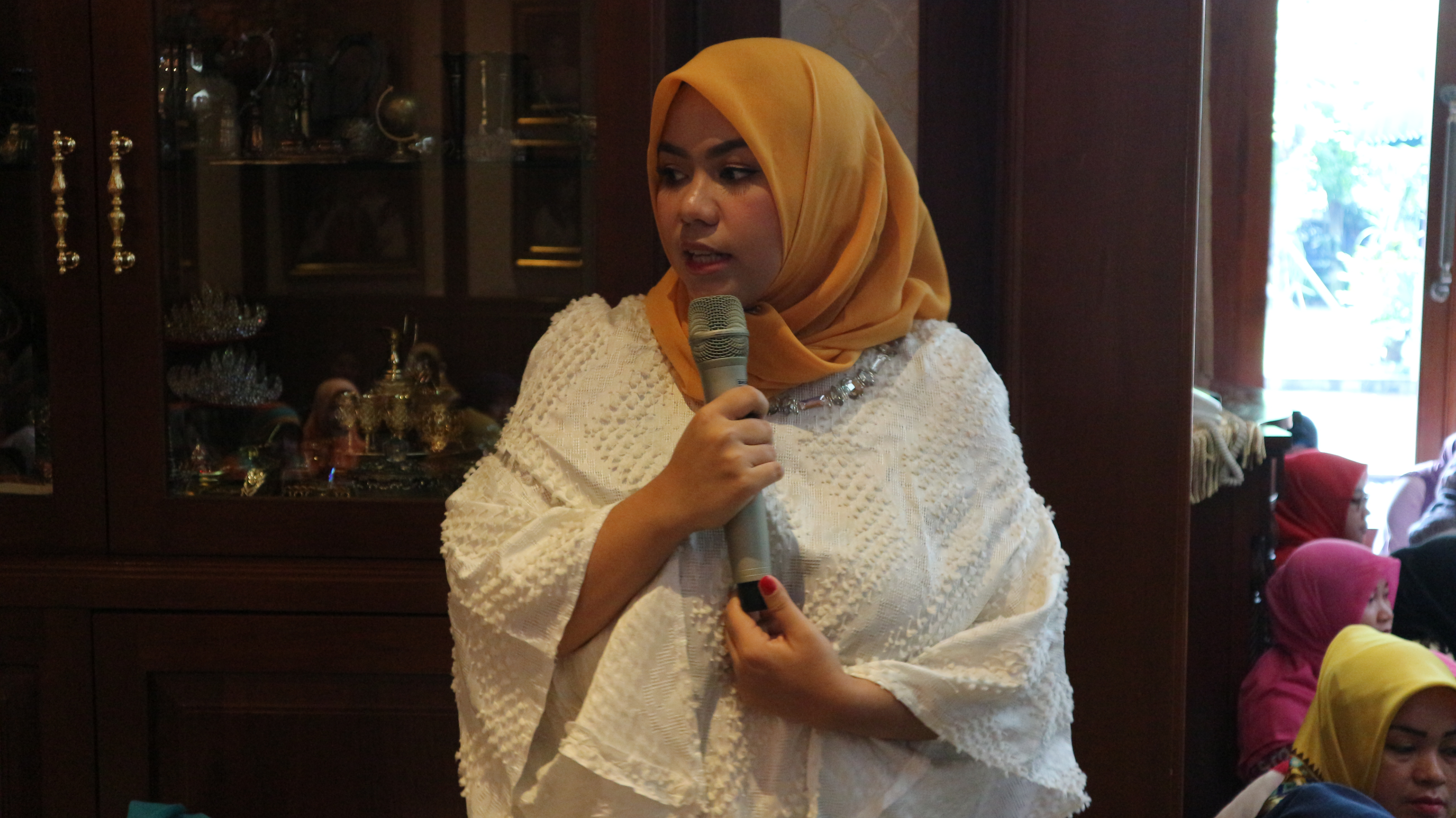 Zita Anjani, Acara Pengajian BPI, 2016